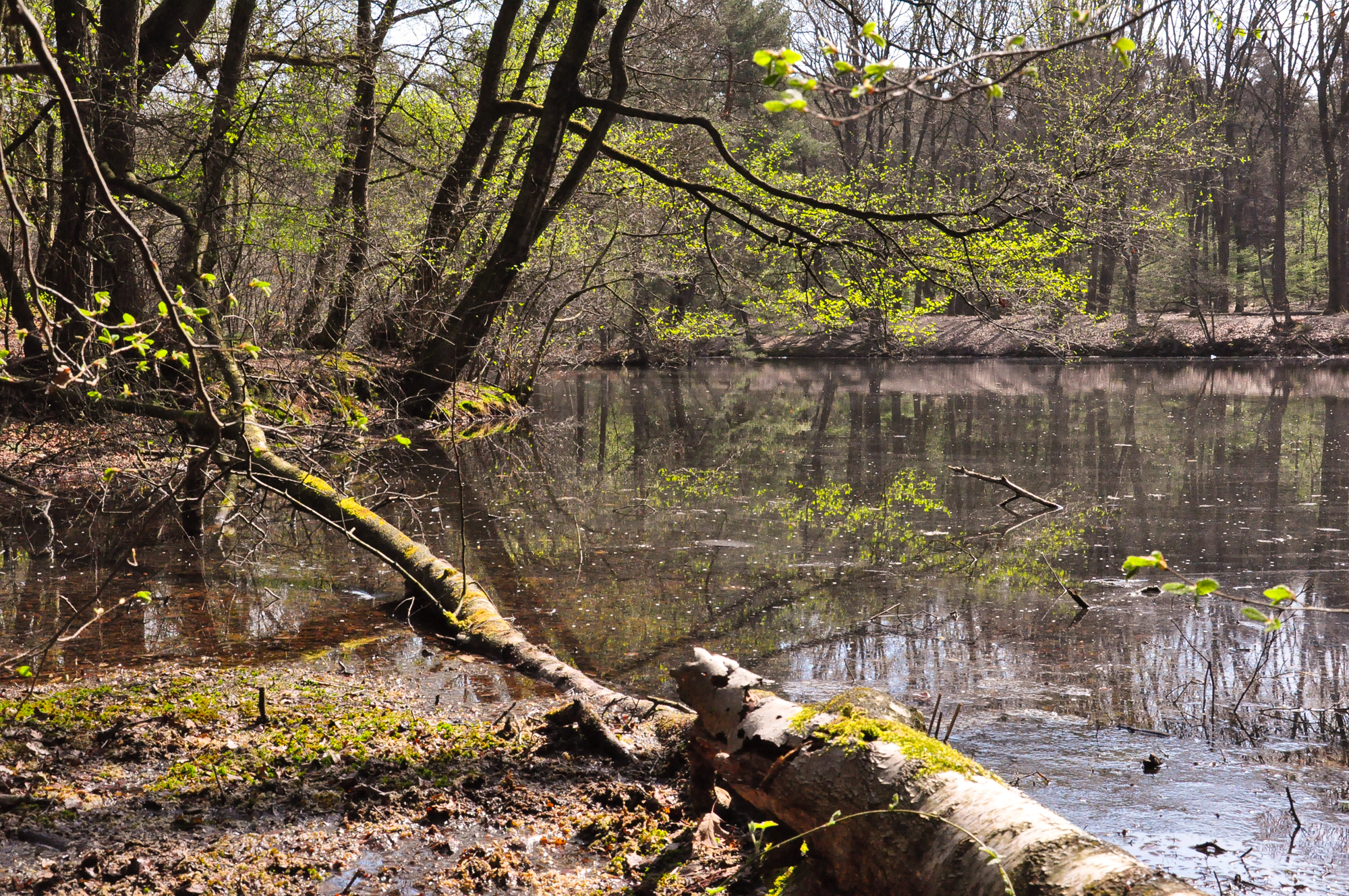 NSG ME-003 Hildener Heide-Schönholz. Im Sumpfwald des Schönholzes.